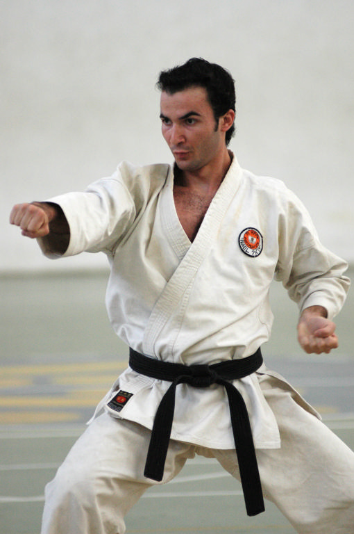 אבי בוקלר, אלוף עולם קרטה.